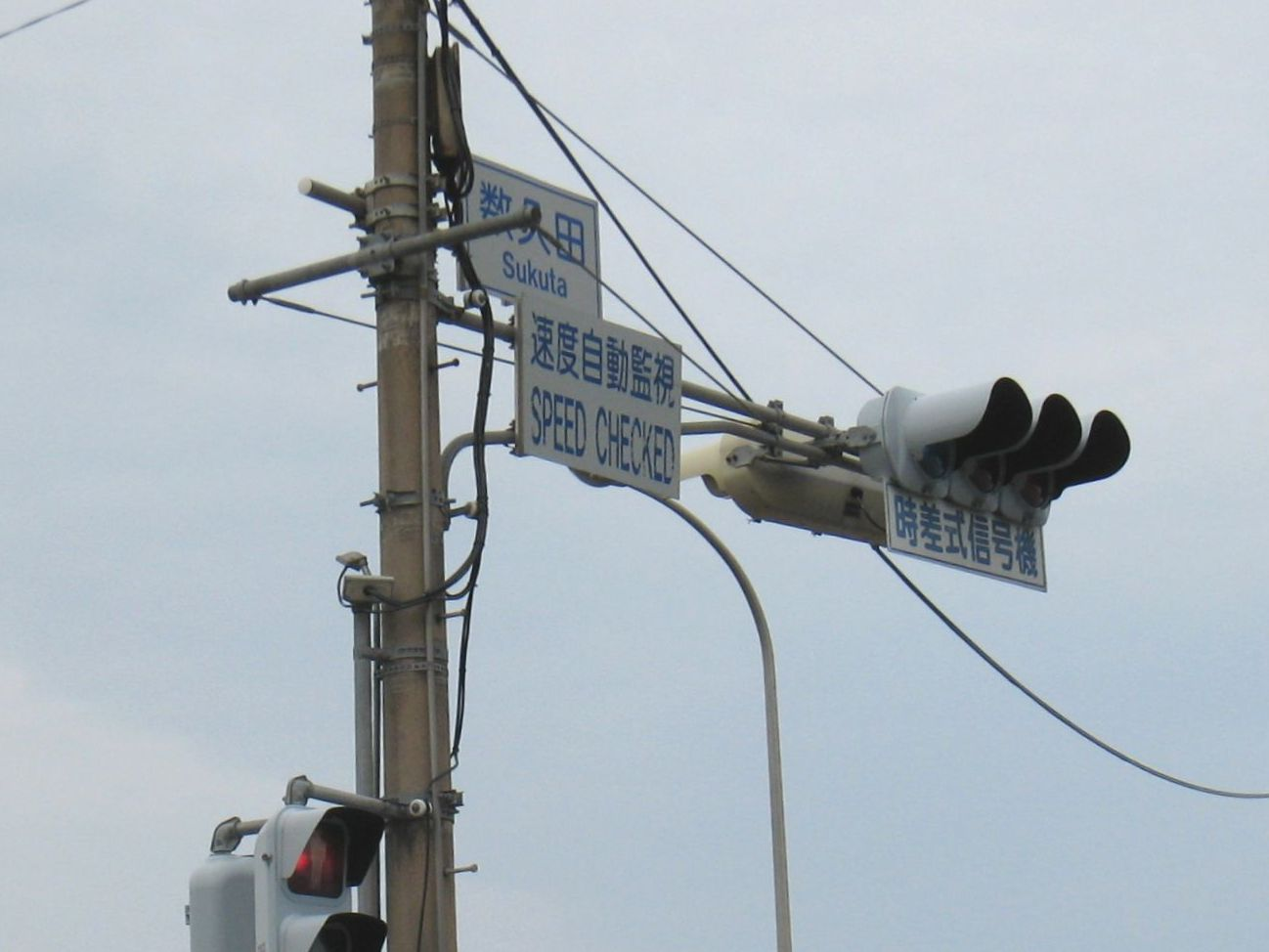 沖縄・速度自動監視